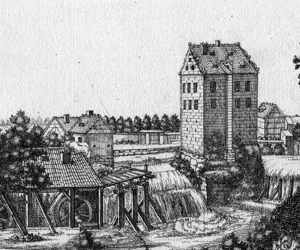 Schloss Kugelhammer, Landkreis Roth